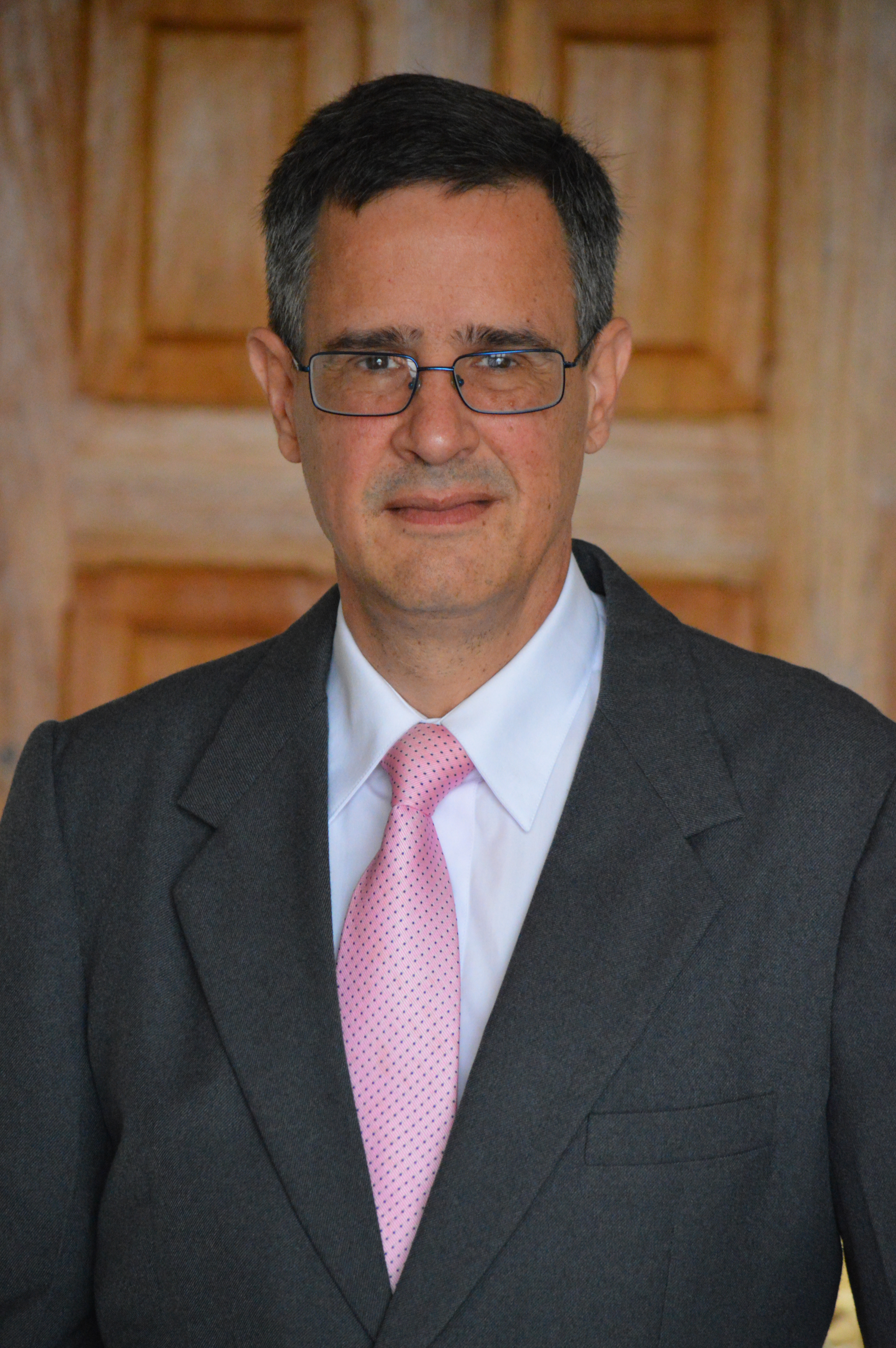 Luis Antonio Sobrado Gonzalez, presidente del Tribunal Supremo de Elecciones de Costa Rica.